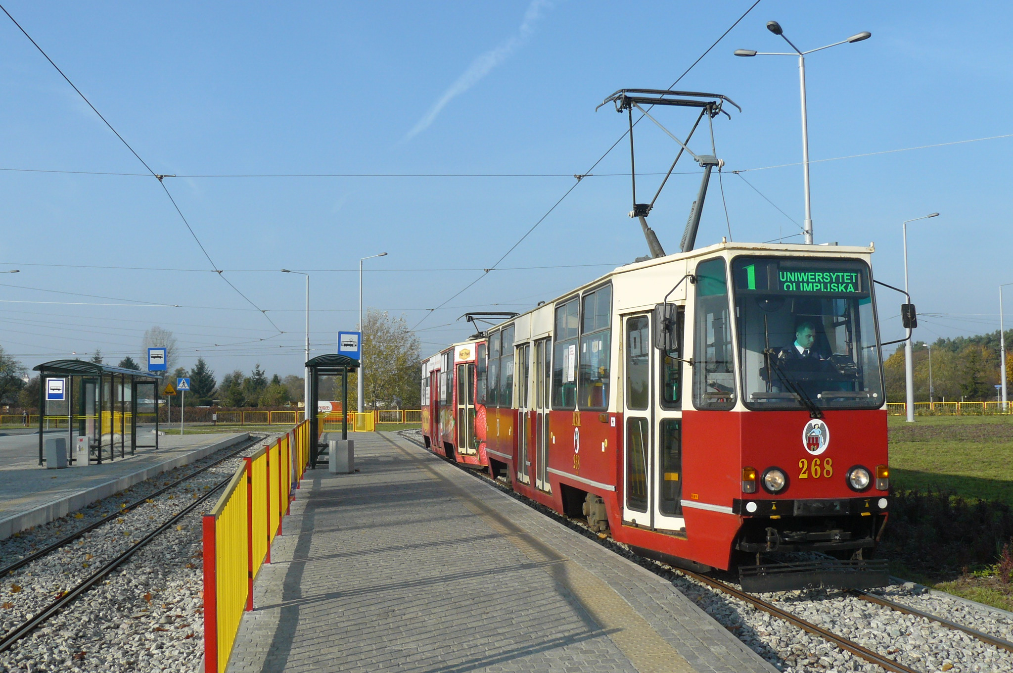 Toruń, tramwaj. Pętla Uniwersytet.